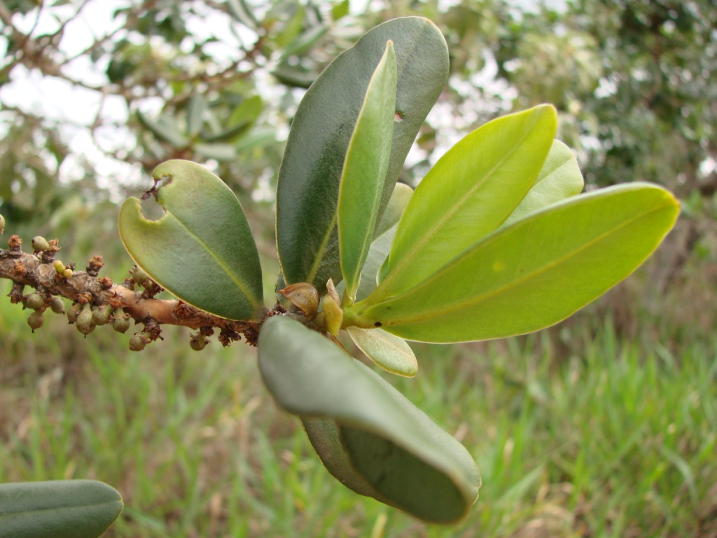 Myrsine guianensis - MYRSINACEAE Jardim Botânico de Brasília - Distrito Federal - Brasil.